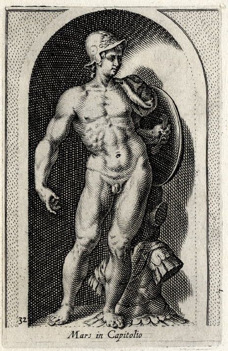 Engraving from Antiquarum statuarum Urbis Romae libri